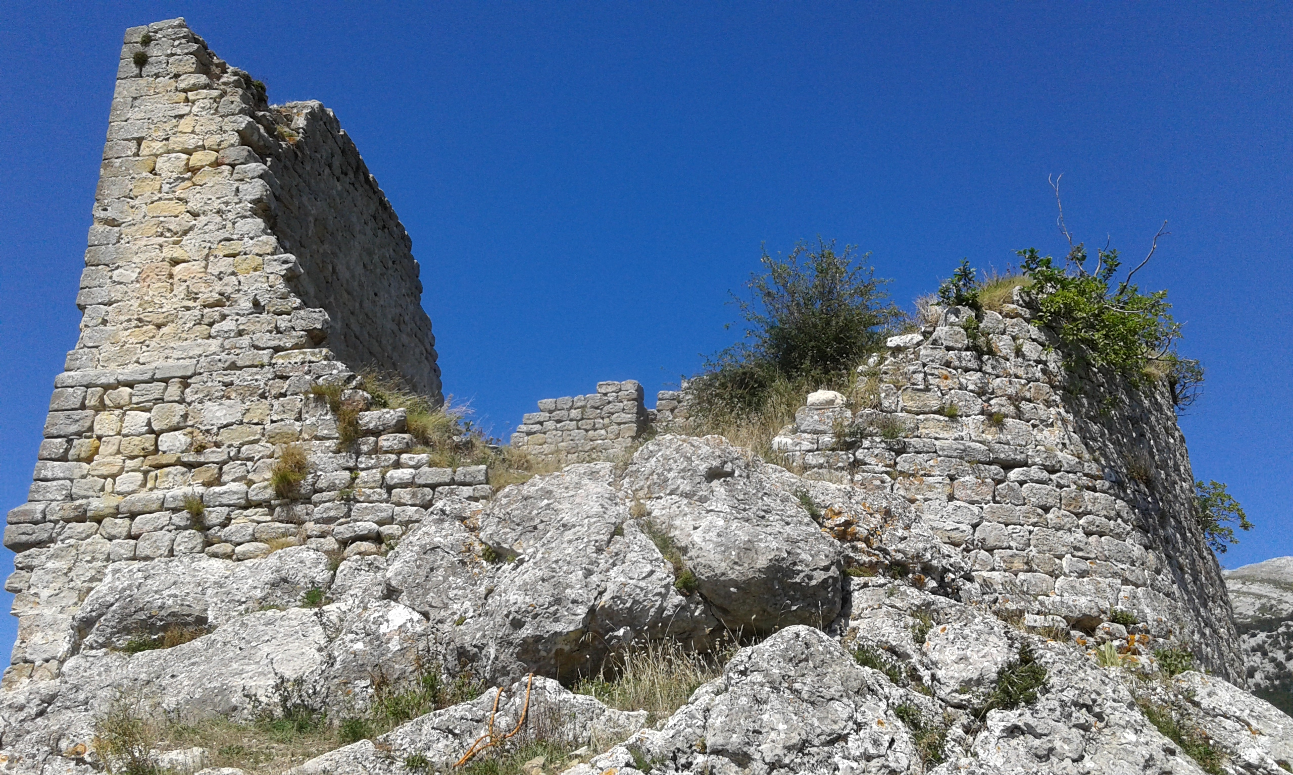 Torre del castillo de Marutegi. AGOSTO 2019 (Araia, Araba/Álava, País Vasco)